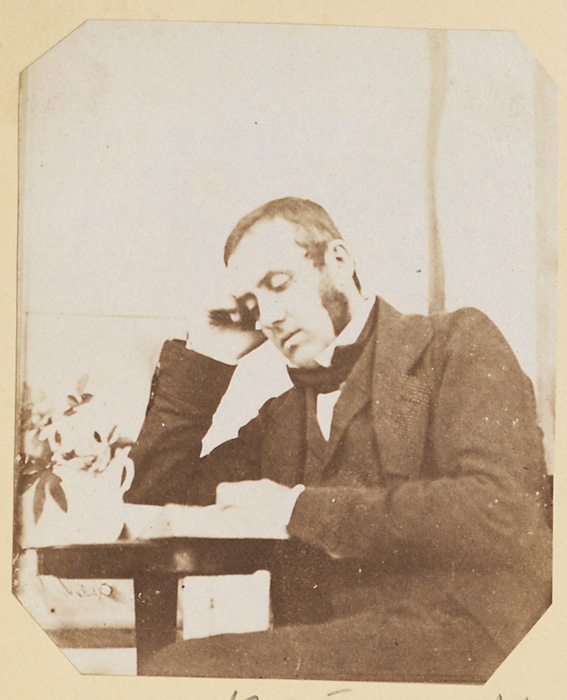 Ffotograffydd/Photographer: Mary Dillwyn (1816-1906) Dyddiad/Date: c. 1853-4 Cyfrwng/Medium: Print taken from a collodion negative. Cyfeiriad/Reference: vin00035 (pb02377/019) Rhif cofnod / Record no.: 3590002 Rhagor o wybodaeth am Ffotograffiaeth Gynnar Abertawe yn Llyfrgell Genedlaethol Cymru More information about Early Swansea Photography at the National Library of Wales